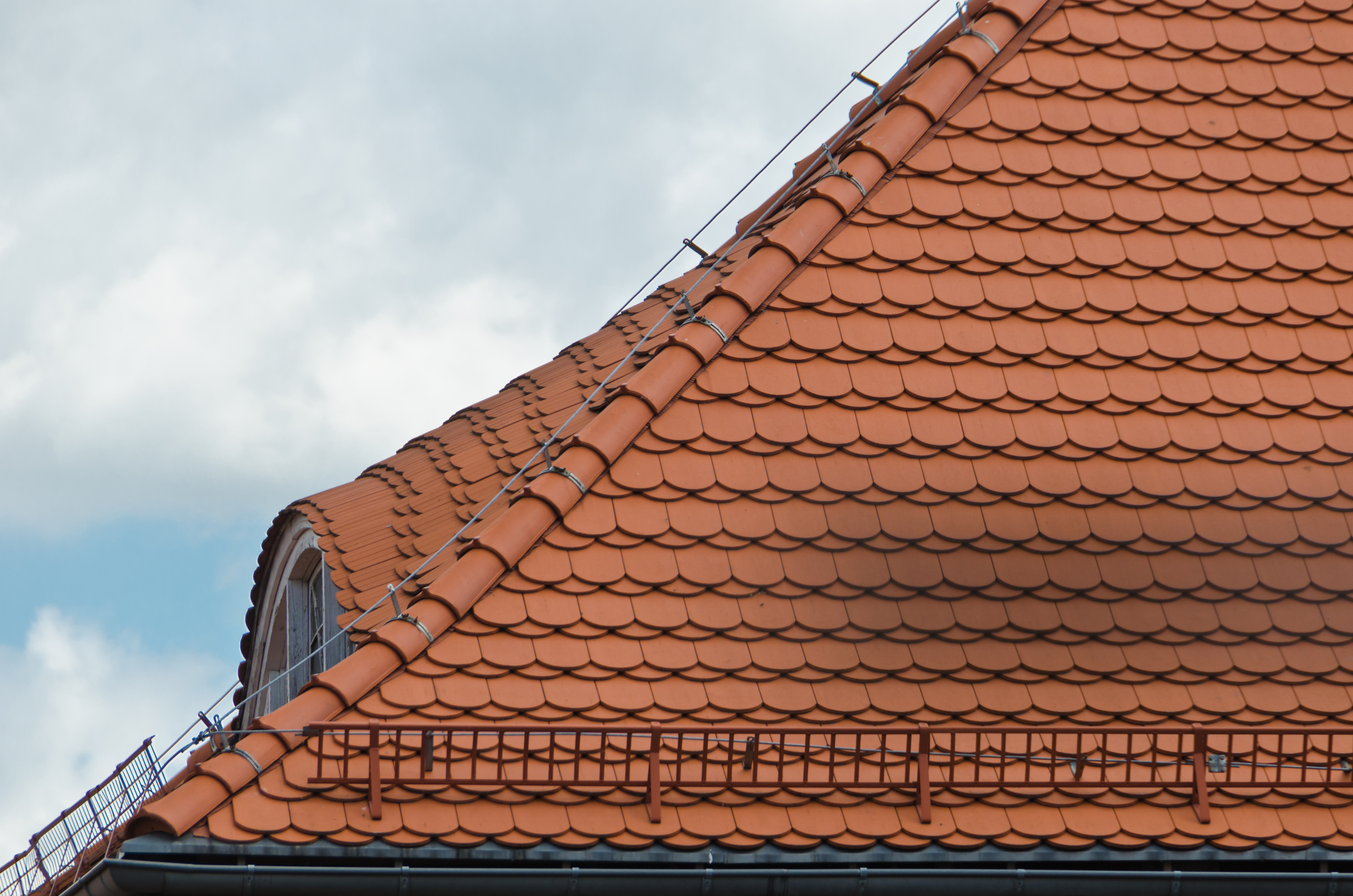 Dachówki